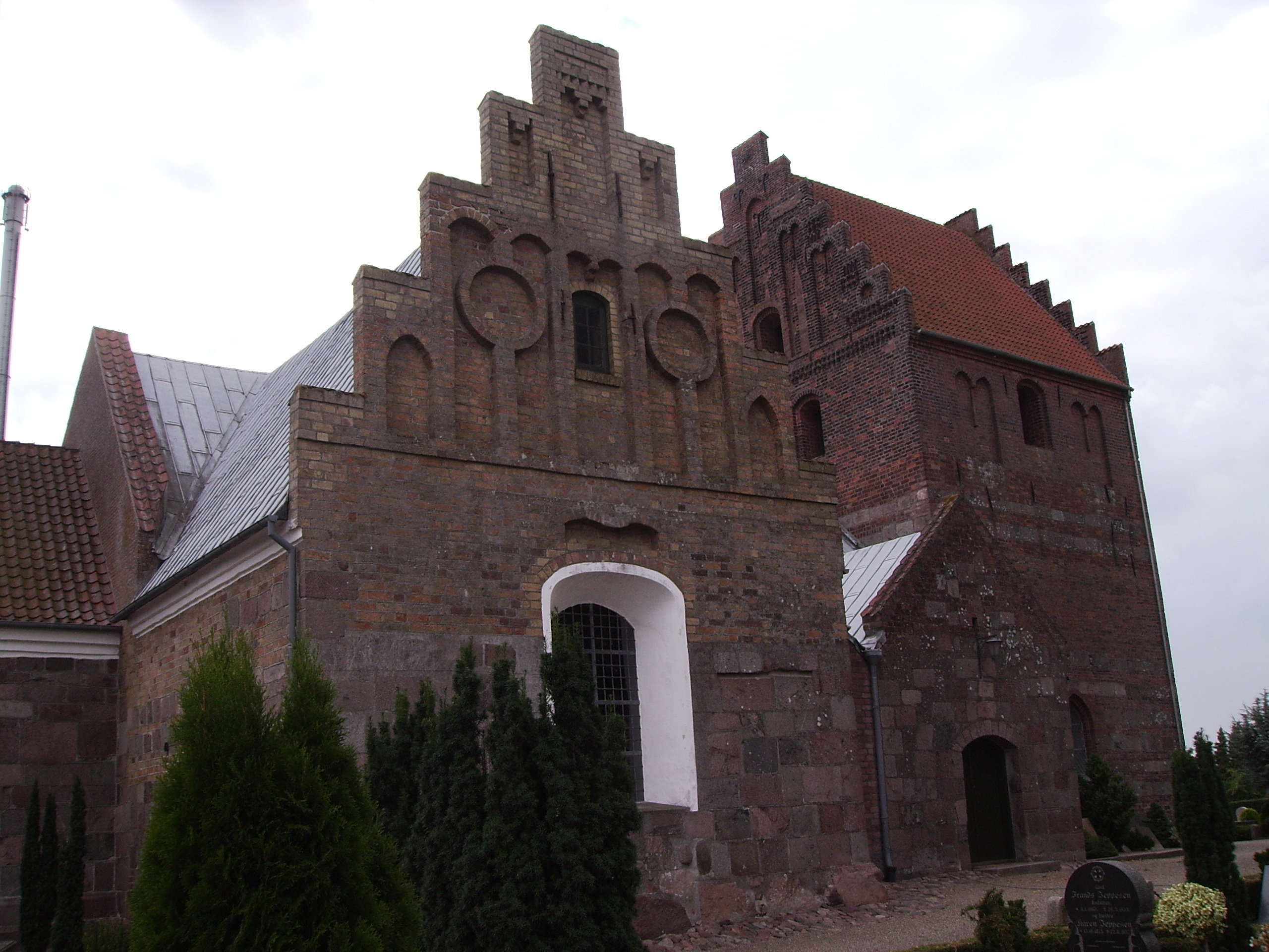 Skamby Kirke fra nordøst, Skamby Sogn, Skam Herred, Odense Amt, Denmark (Danish Church)